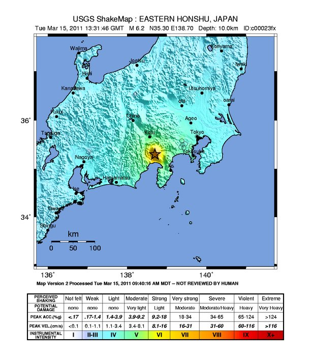 Shizuoka Earthquake (March 15, 2011) Shakemap